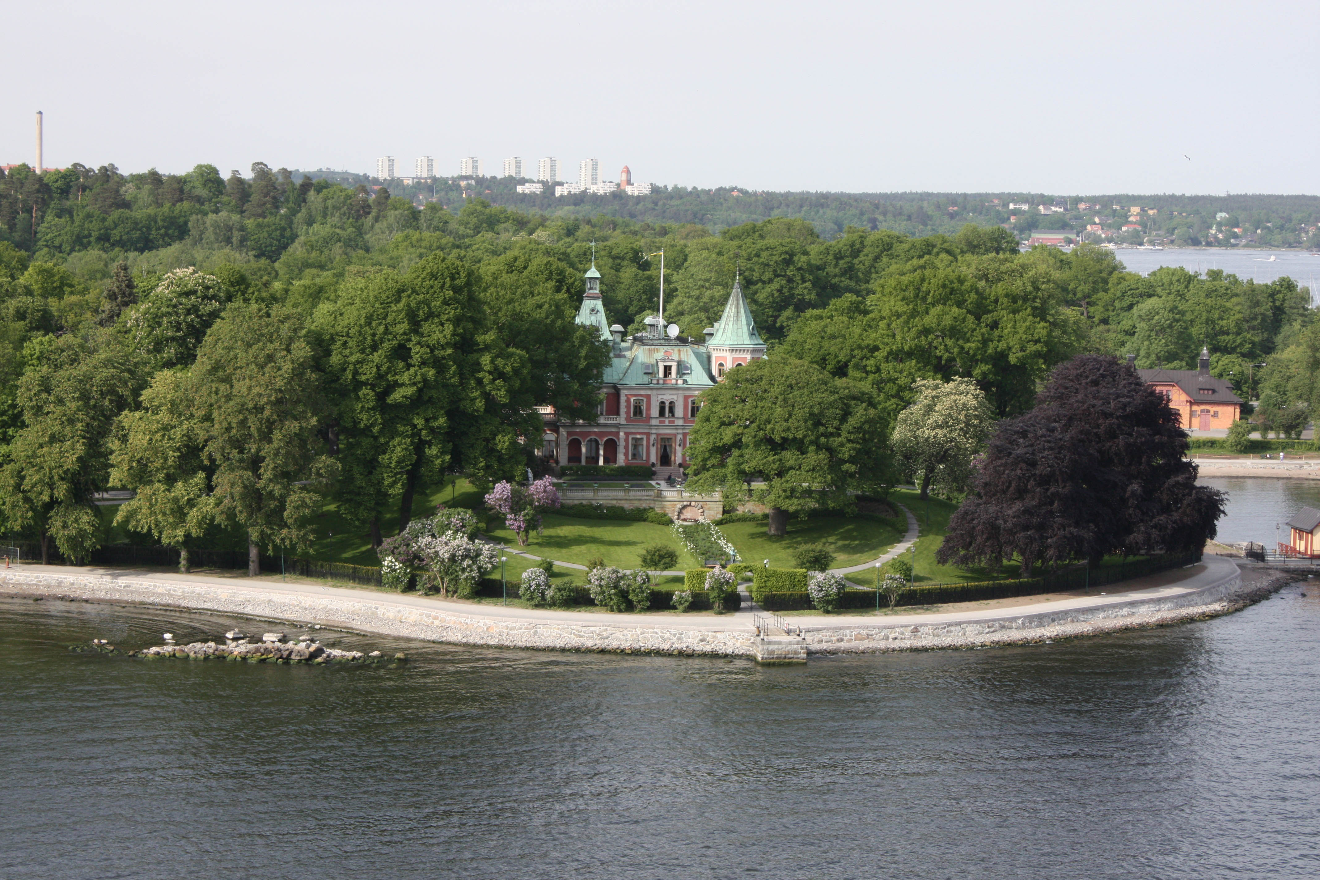 Prima abitazione di Raoul Gustav Wallenberg